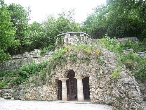 Грот Дианы — одна из наиболее старых и известных достопримечательностей города Пятигорск.